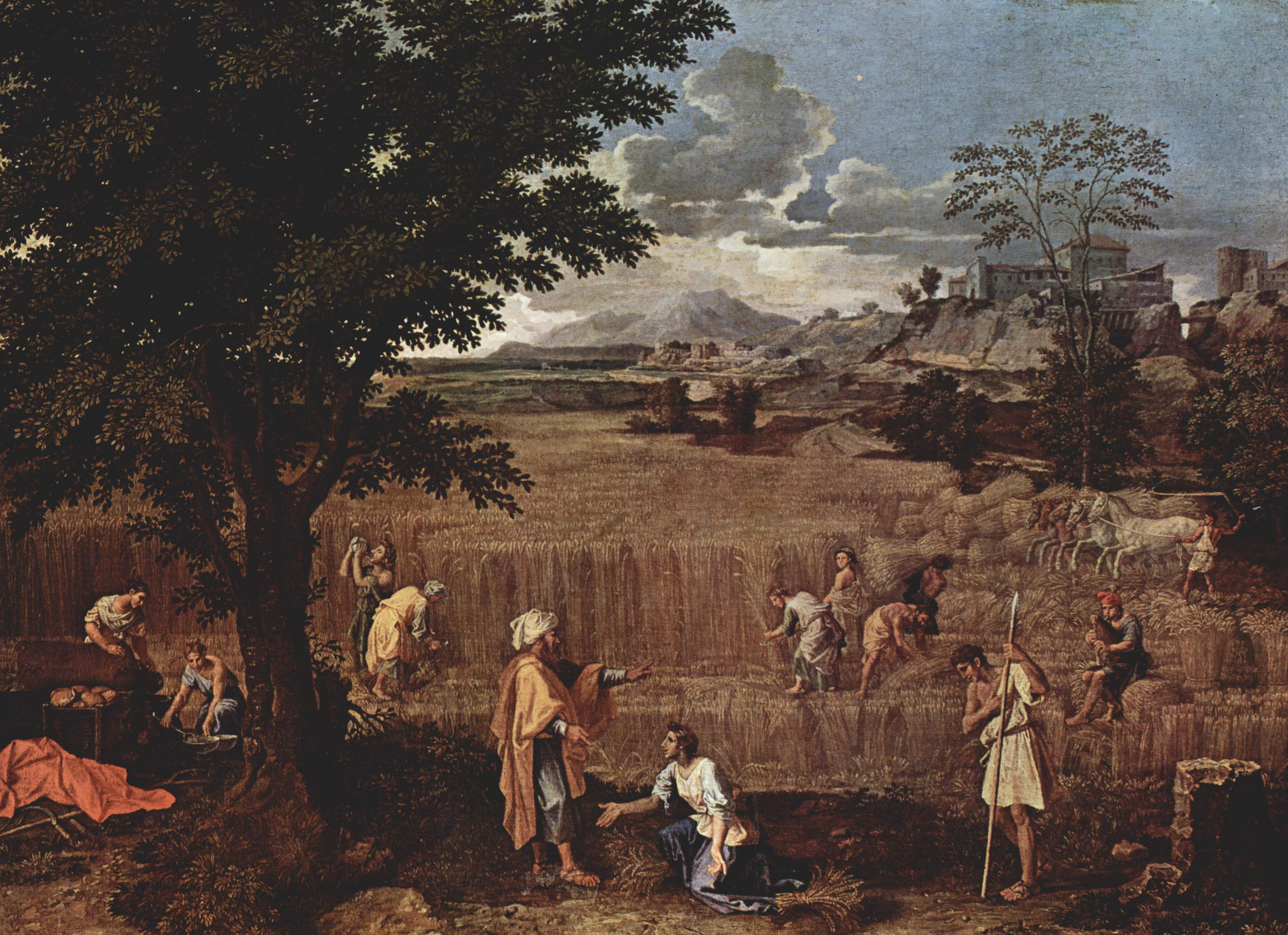 Landscape